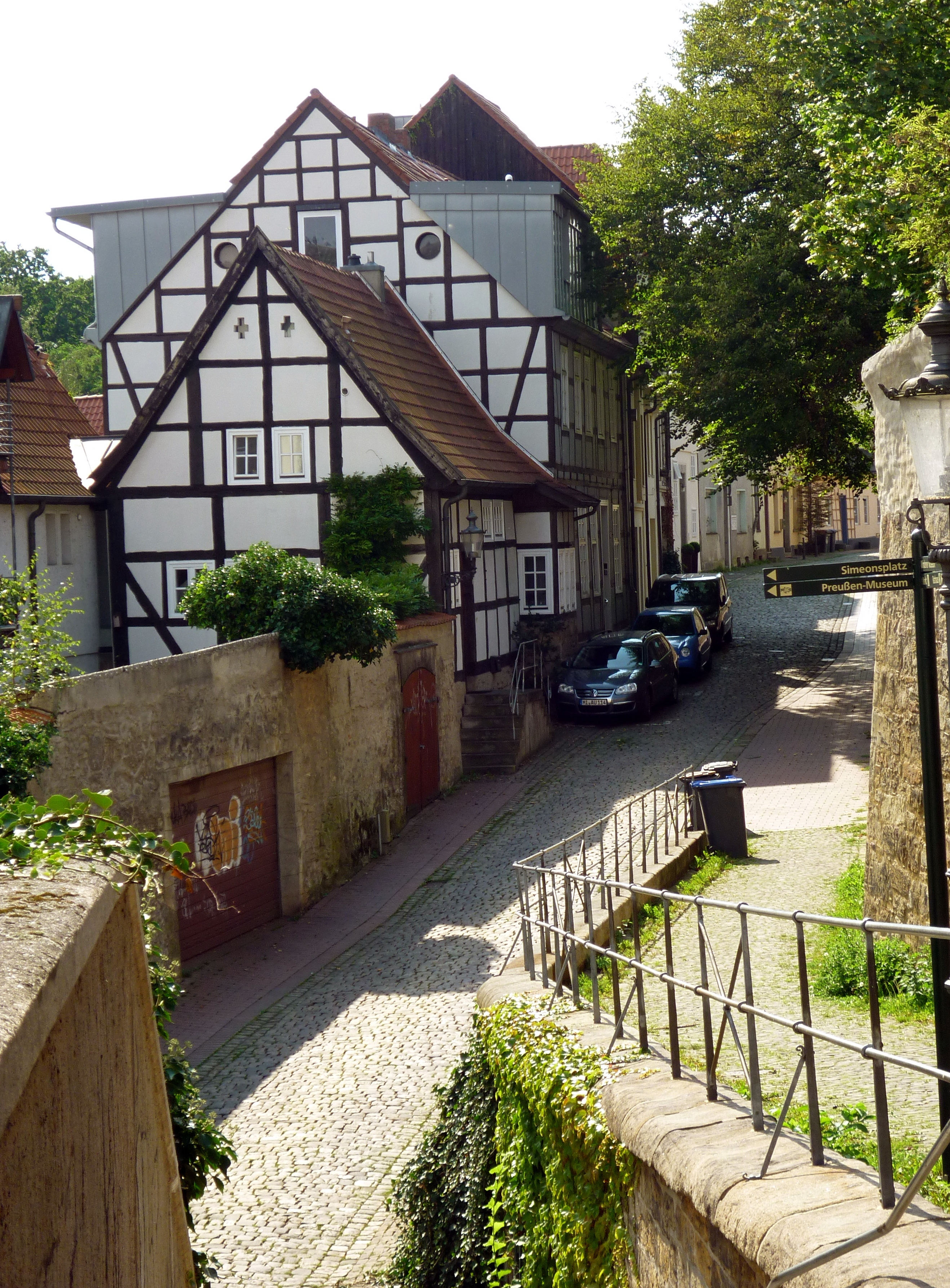 Minden: Fachwerkhäuser an der Straße Weingarten.